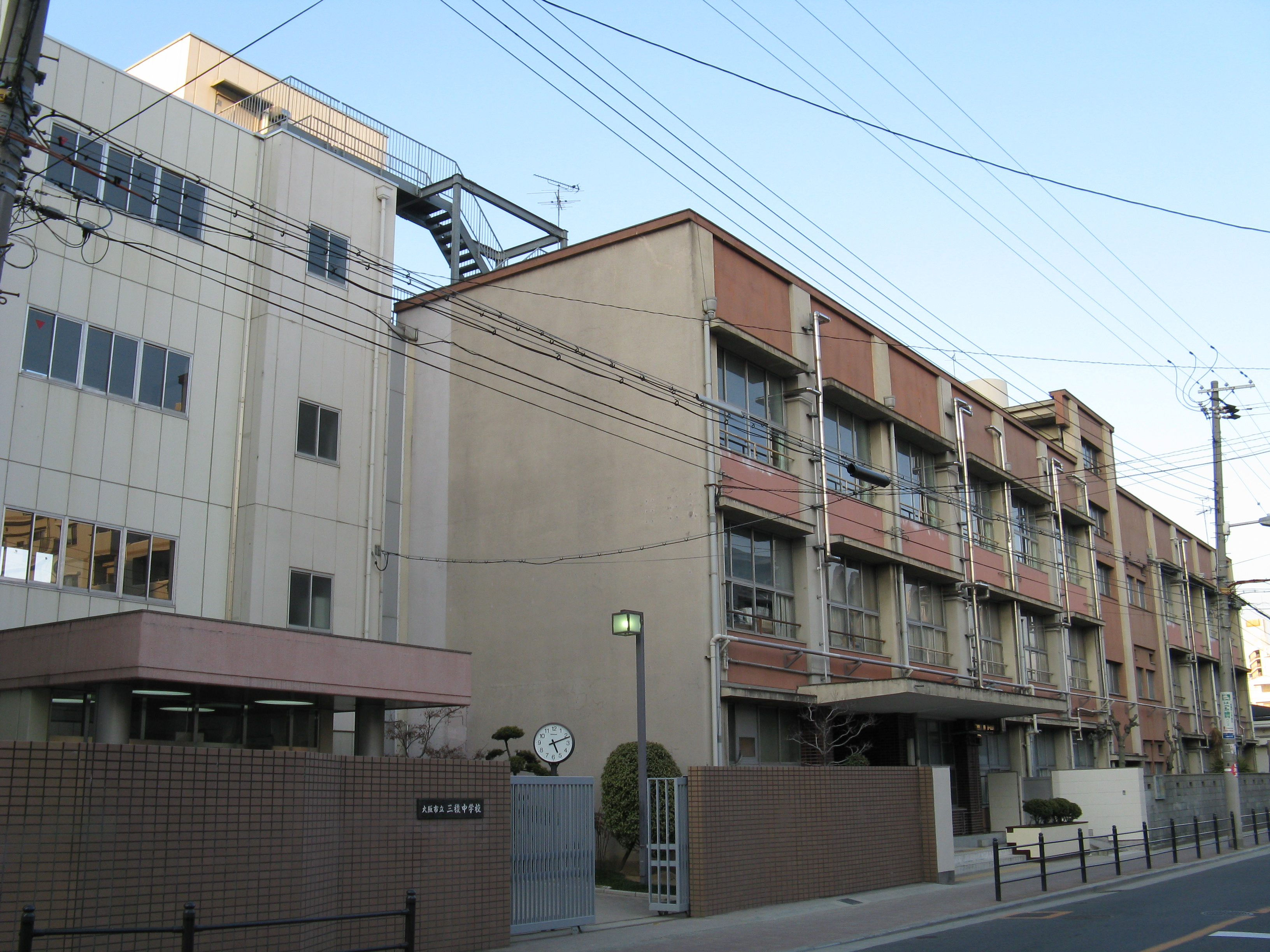 大阪市立三稜中学校